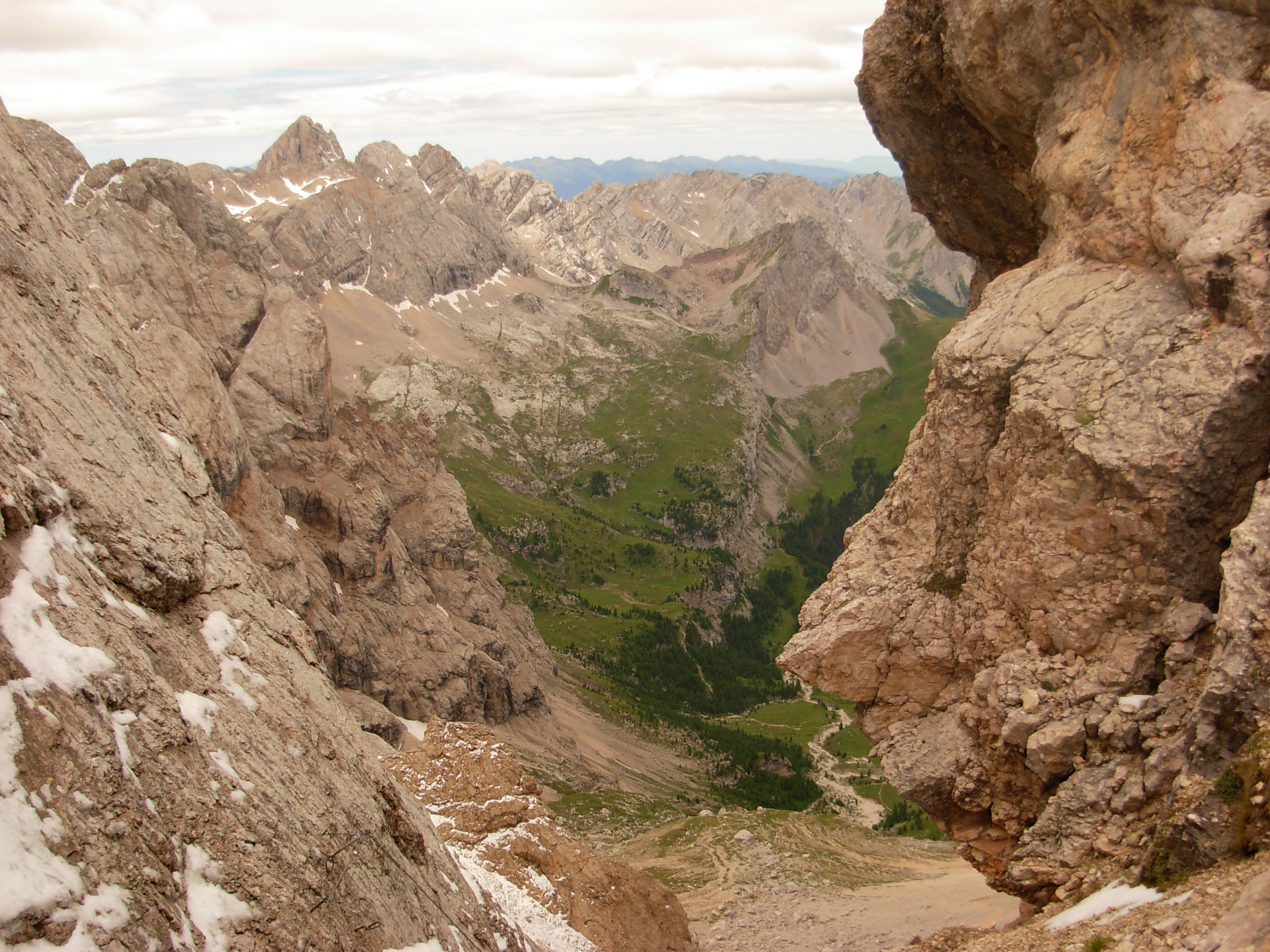 View to Val Rosalia from Forcella de la Marmolada